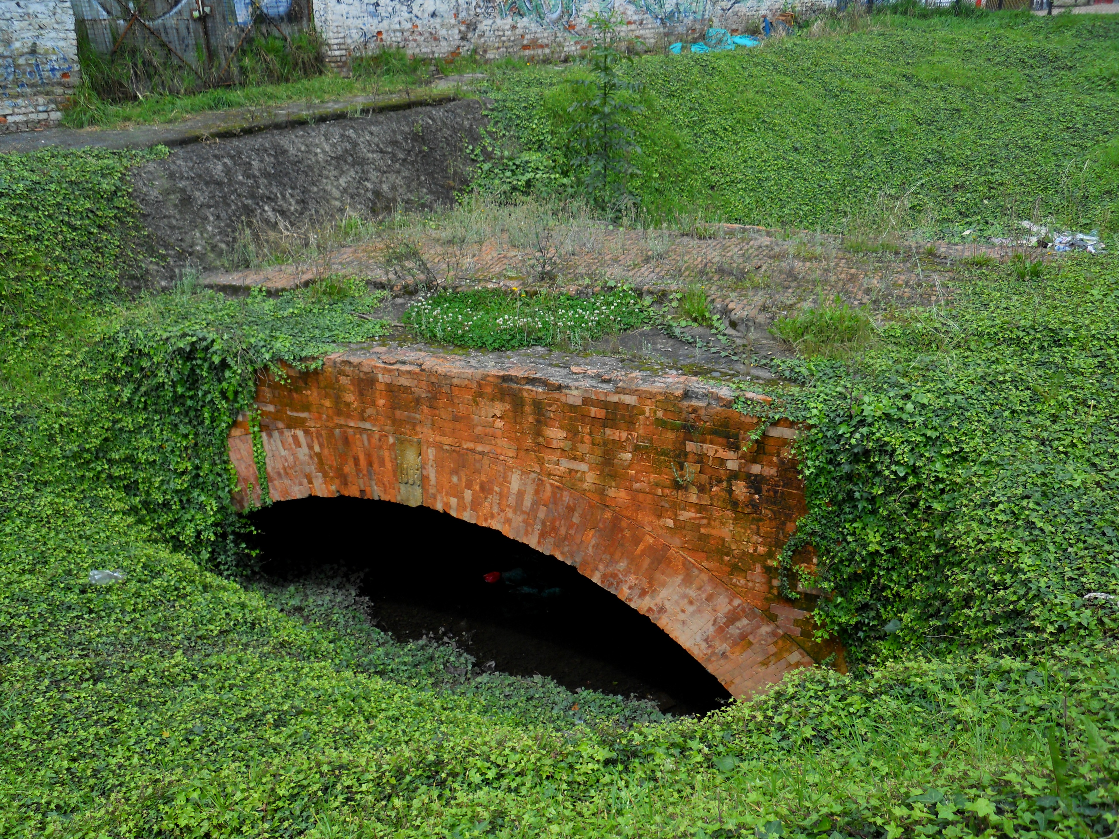 Puente en el Eje Ambiental sobre el antiguo cause del río San Francisco. Bogotá.